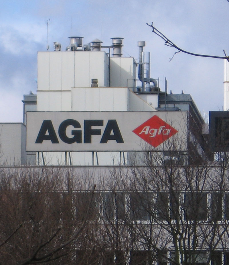 Agfa bord, Rijswijk